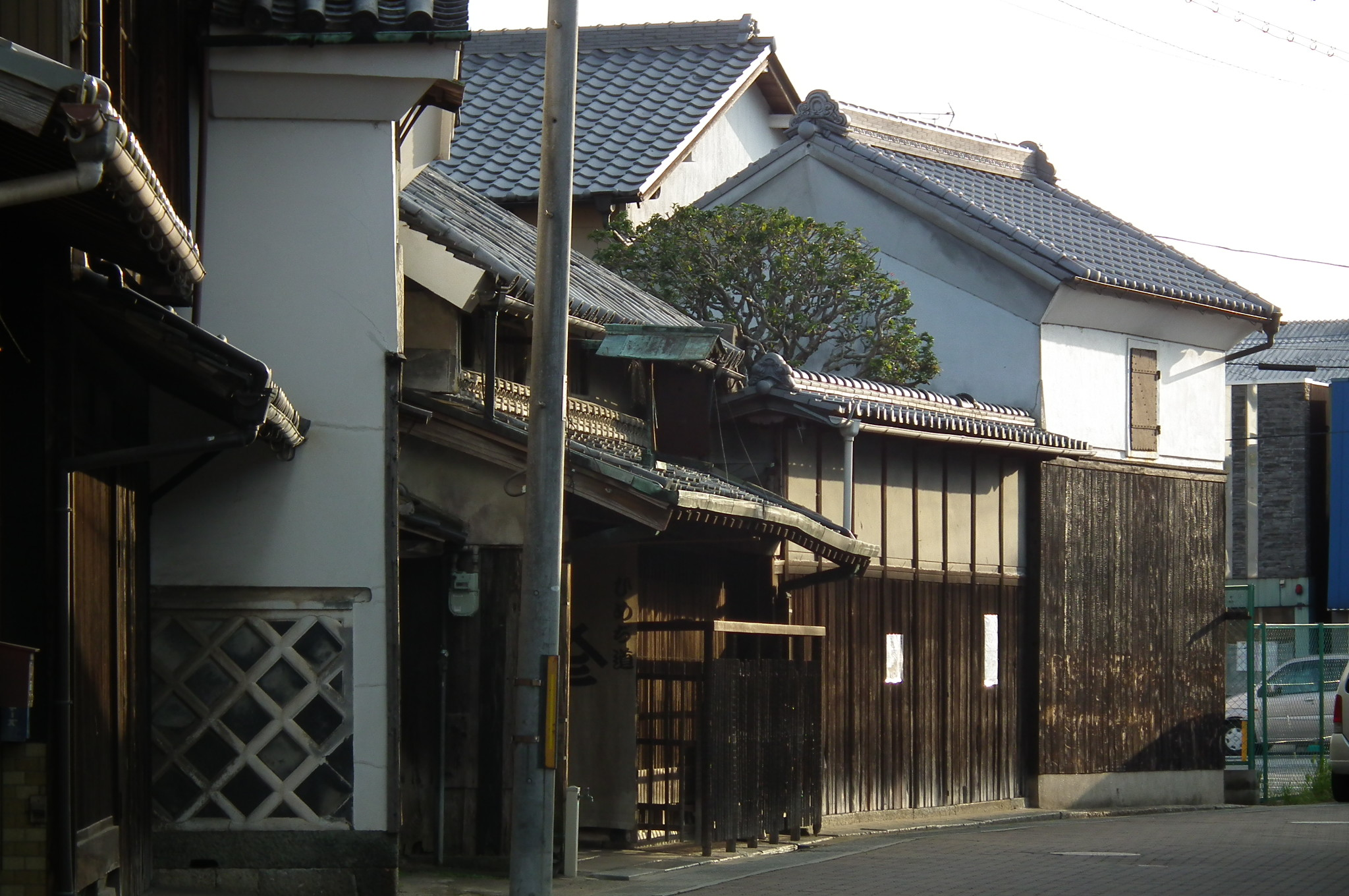 三木市本町二丁目 黒田質店 ひめじ道 Honmachi2-Miki